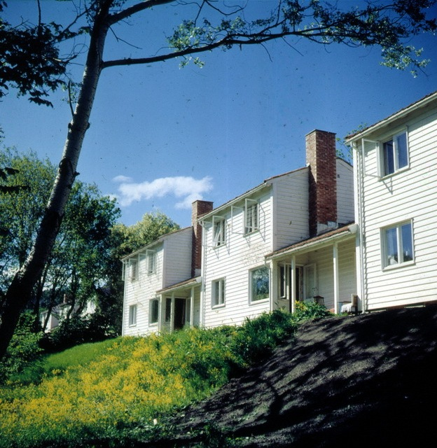 Kunstnerkolonien på Ekely, Edvard Munchs tidligere eiendom.